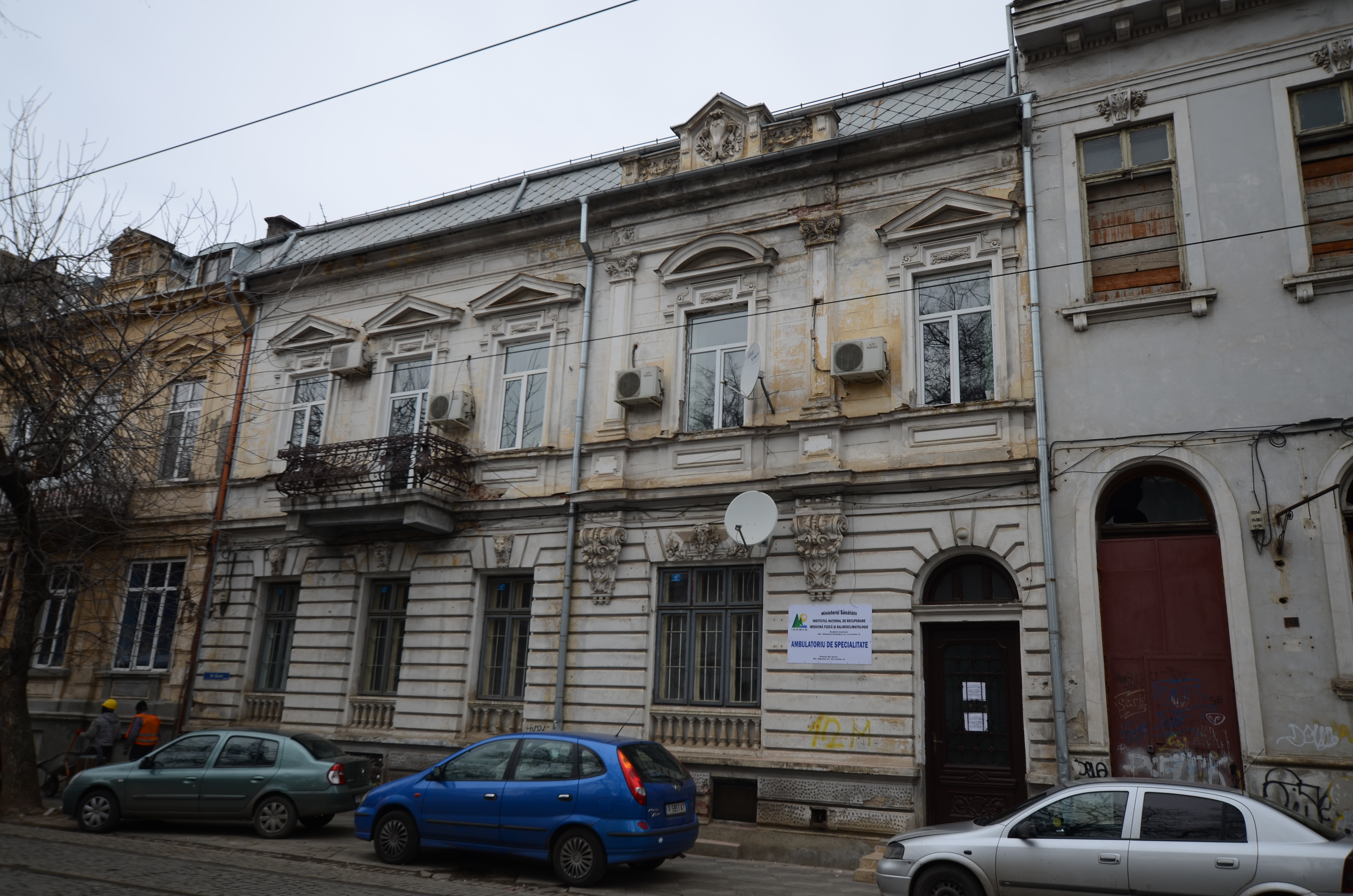 Casă, Str. Băniei nr. 19, București